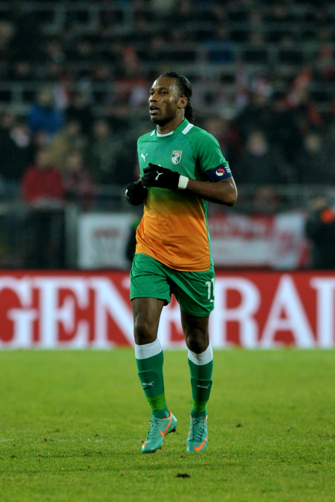 ÖFB freundschaftliches Länderspiel - Österreich vs Elfenbeinküste am 14. November 2012 The making of this work was supported by Wikimedia Austria. For other files made with the support of Wikimedia Austria, please see the category Supported by Wikimedia Österreich. Elfenbeinküste Nr. 11: Didier Drogba